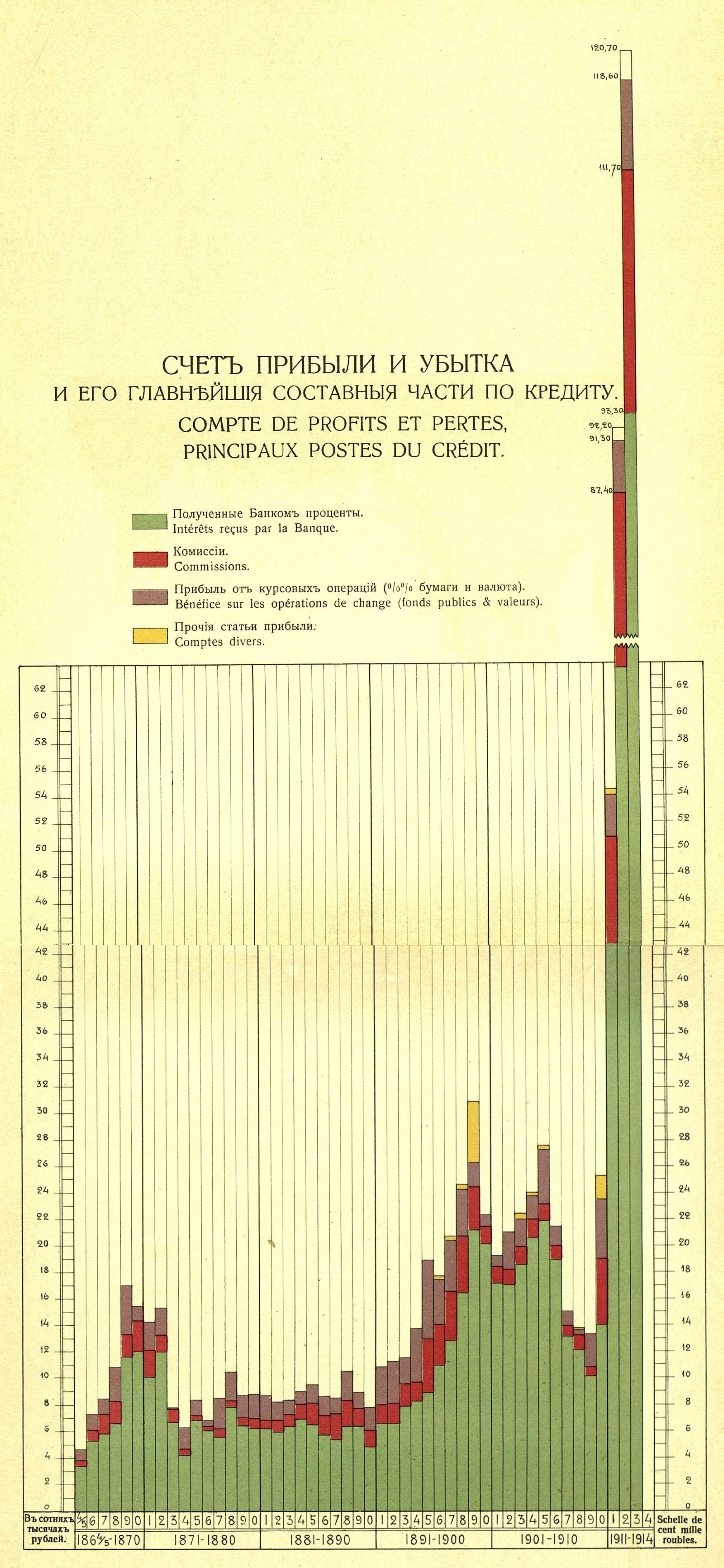 Прибыль Санкт-Петербургского частного коммерческого банка, 1864-1914